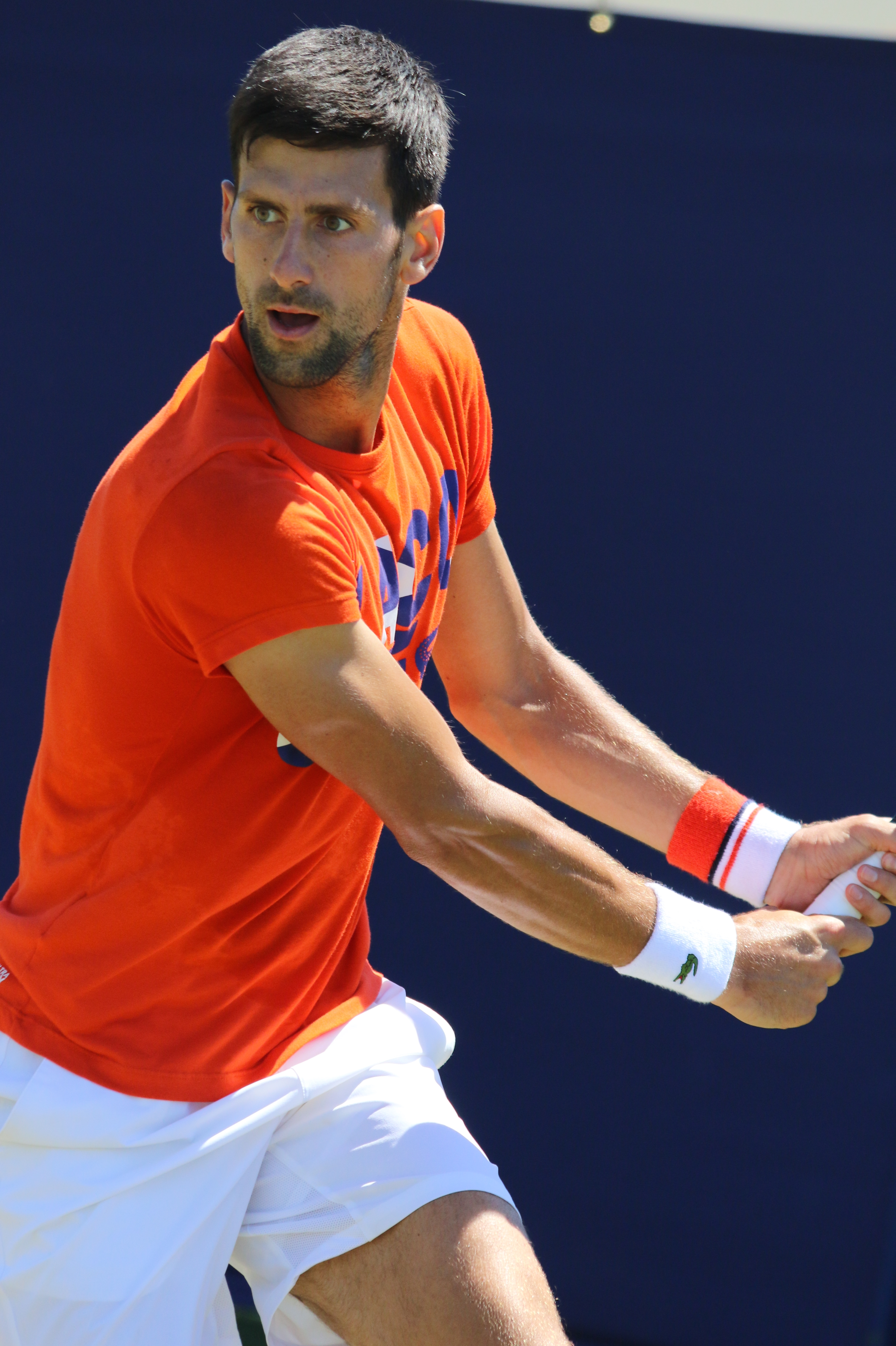 Djokovic EBN17 (26)